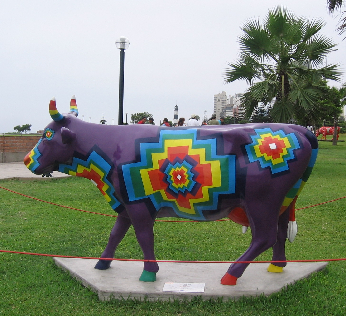 Cruzuyo